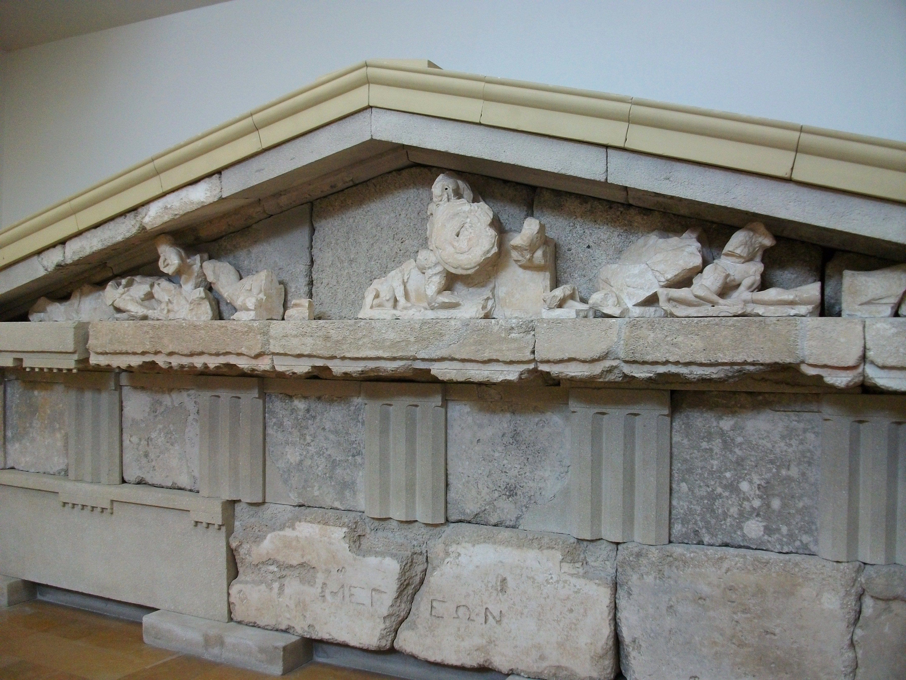 Frontó del tresor de Mègara, 520 aC. Museu Arqueològic d'Olímpia.